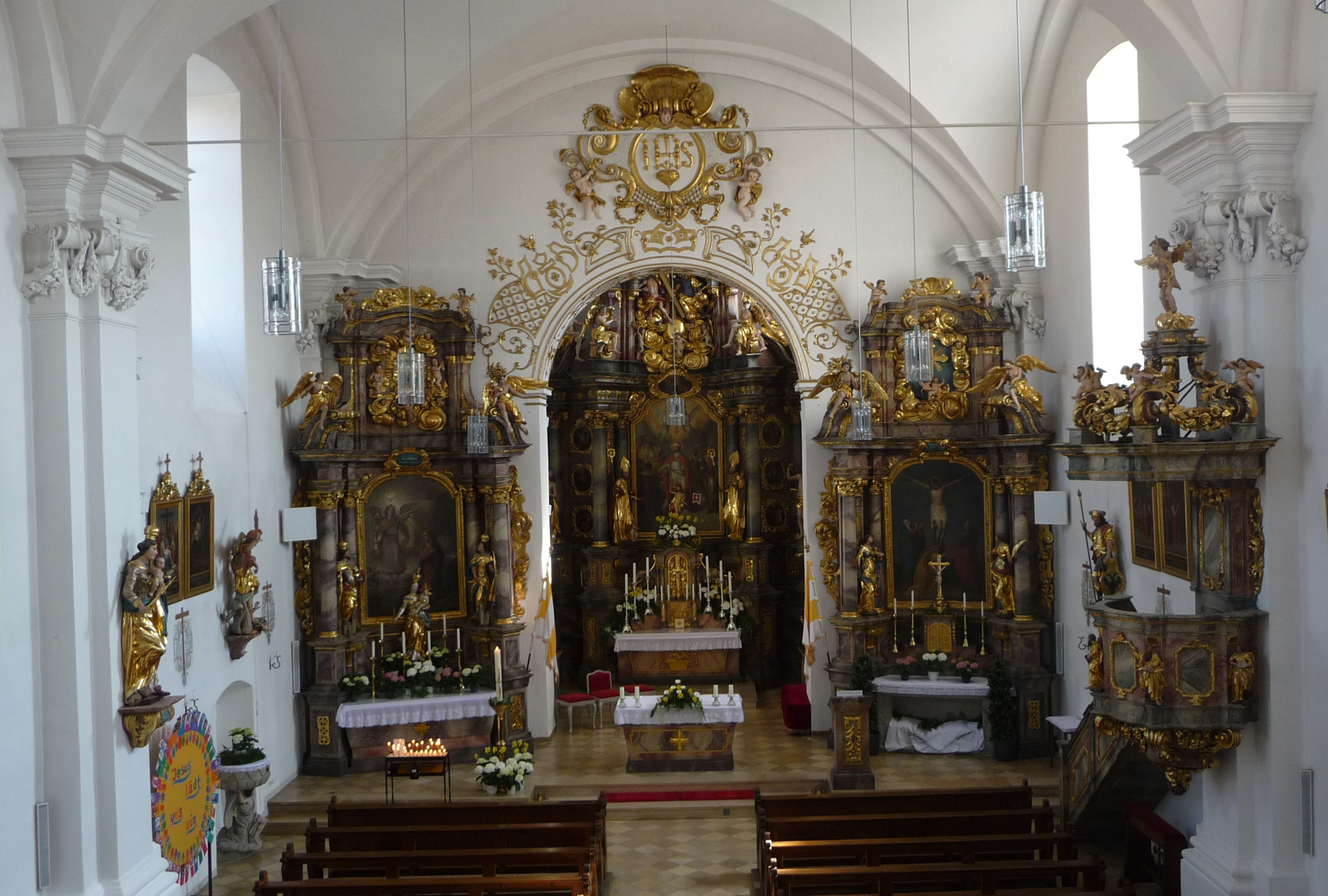 Sankt Wenzeslaus (Litzendorf)